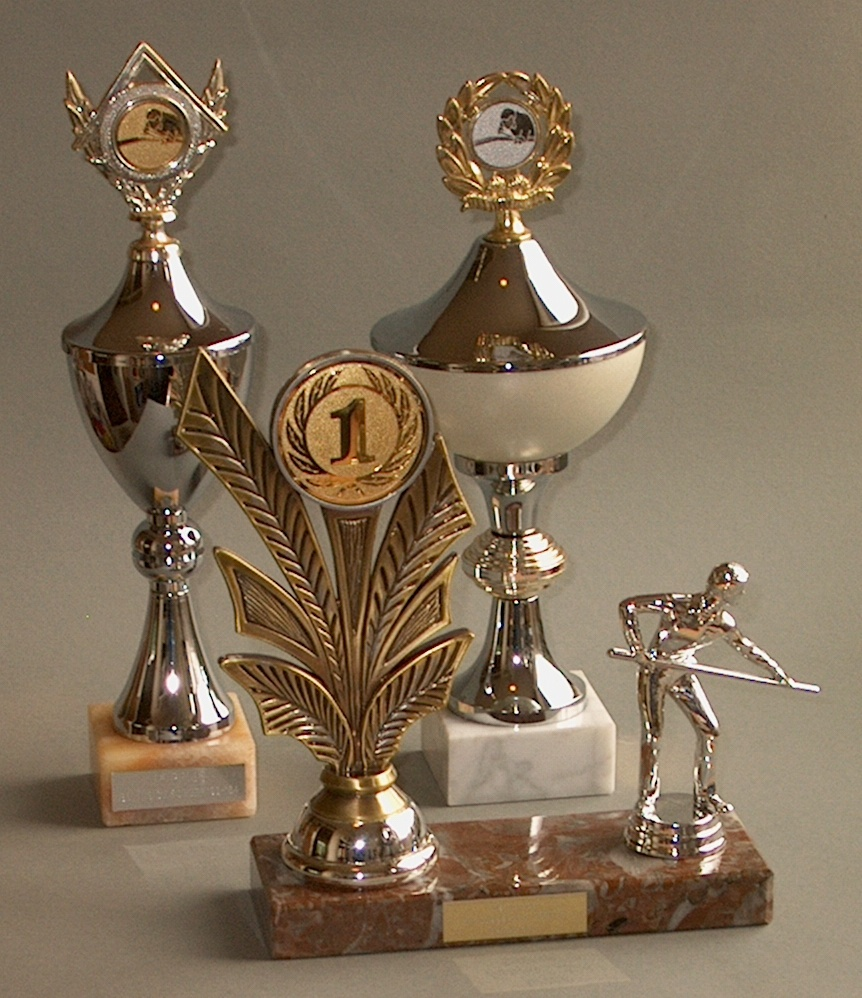 Diverse sportprijzen (biljarten).